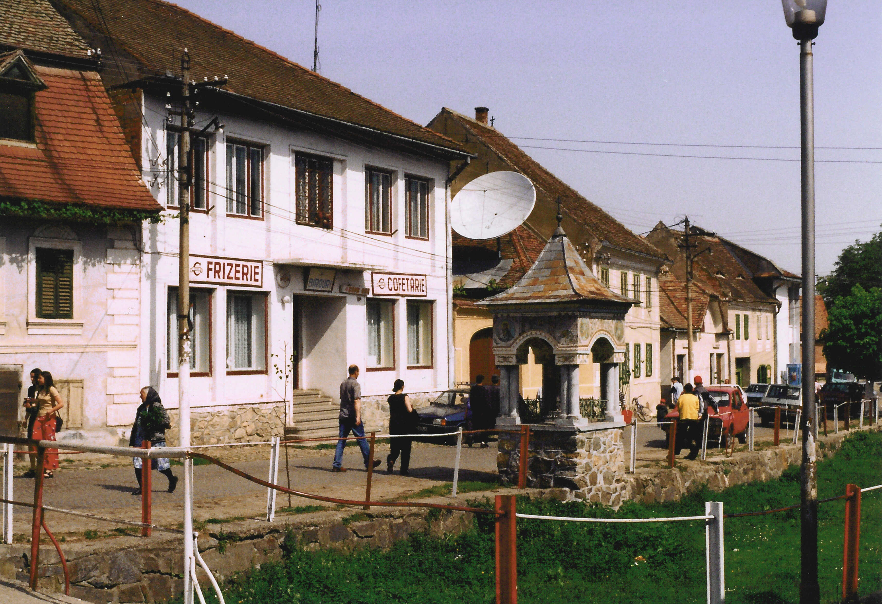 Răşinari, Sibiu County, Romania.